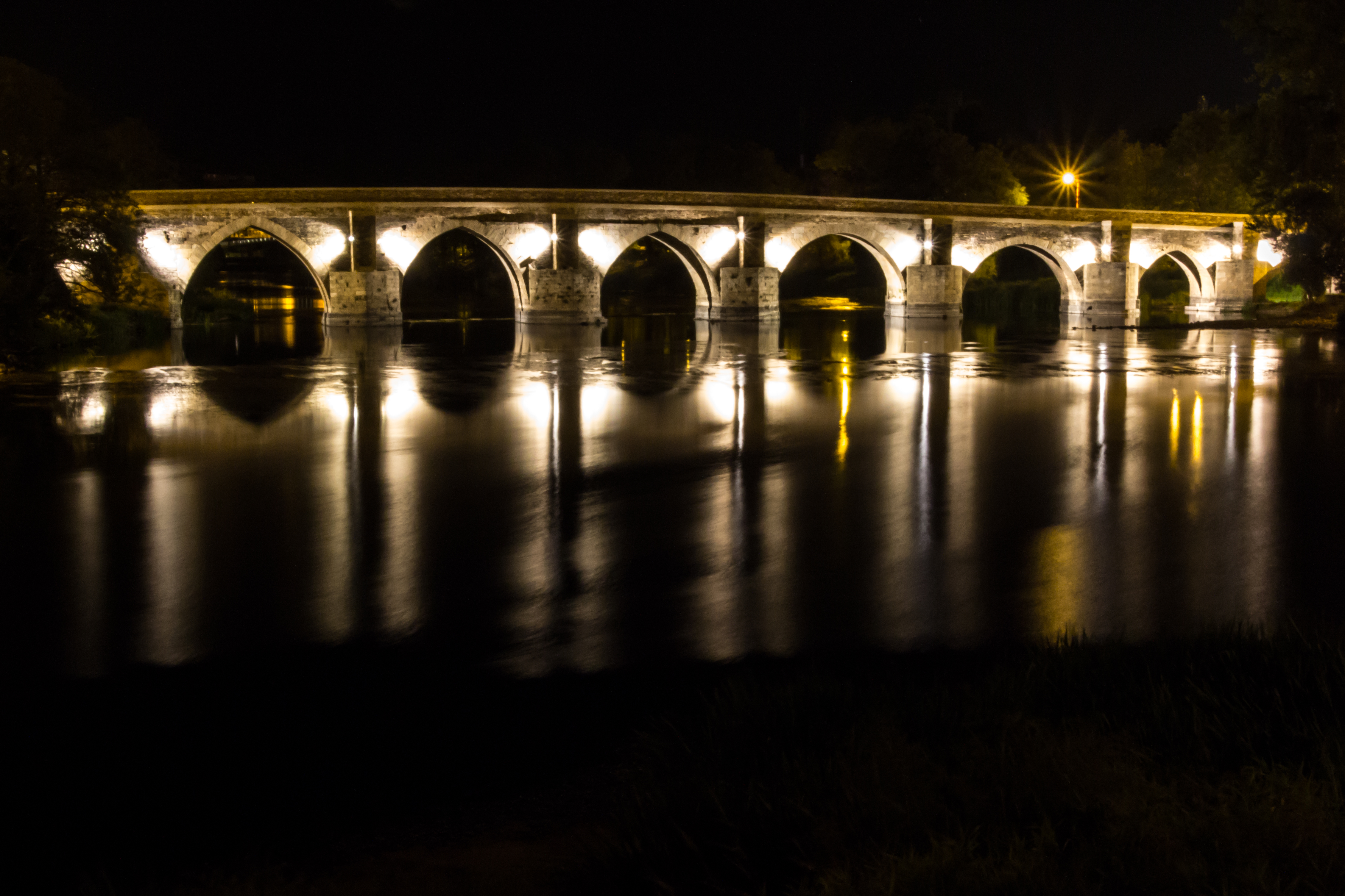 Puente romano de Lugo.